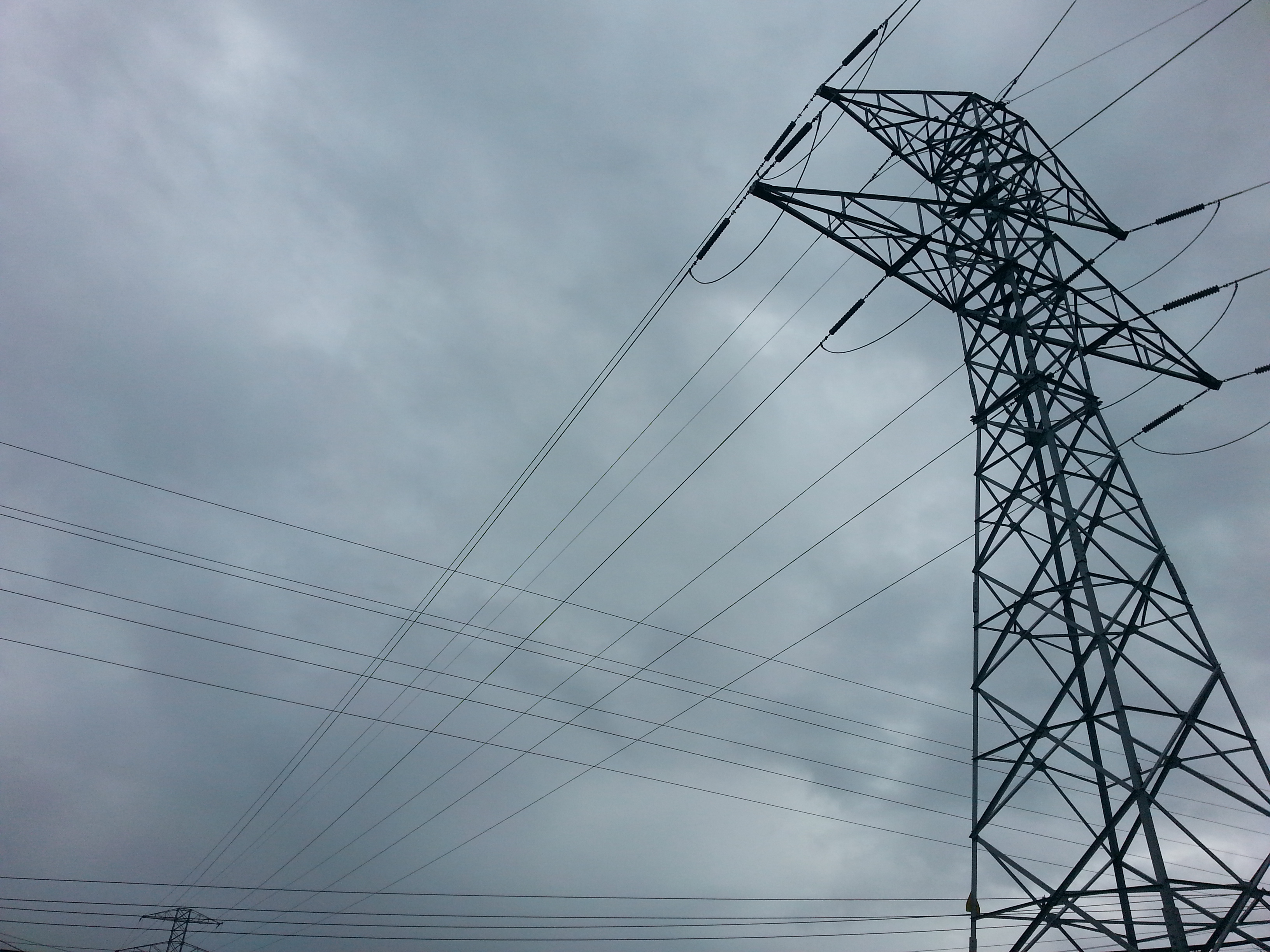 Elektrika-dorrea, kableak.